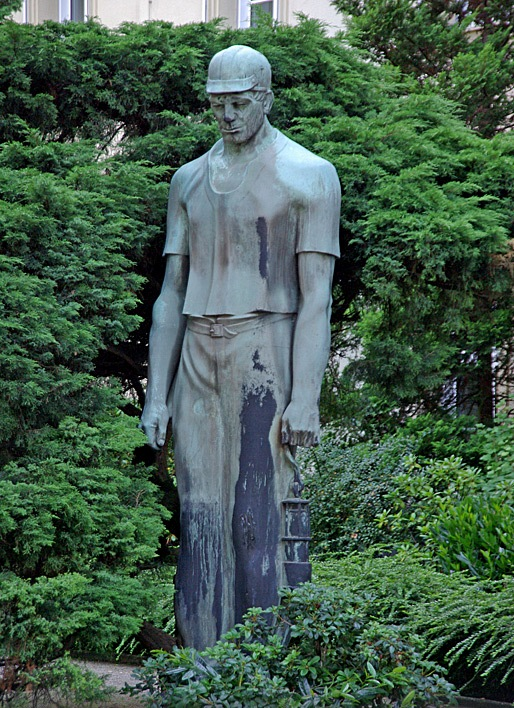 Skulptur des Bildhauers Erich Schmidtbochum. Erschaffen 1950-51 Standort: Bochum